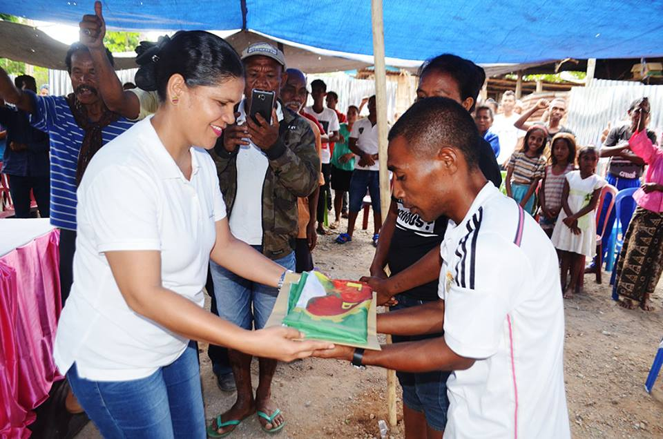 Gründung eines Ortsverbandes der Partidu Libertasaun Popular im Suco Sananain, Verwaltungsamt Laklubar, Gemeinde Manatuto